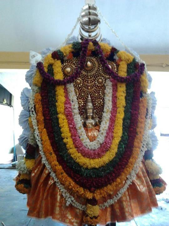 ചെറിയനാട് ശ്രീ ബാലസുബ്രഹ്മണ്യസ്വാമീക്ഷേത്രത്തിലെ തിടമ്പ്